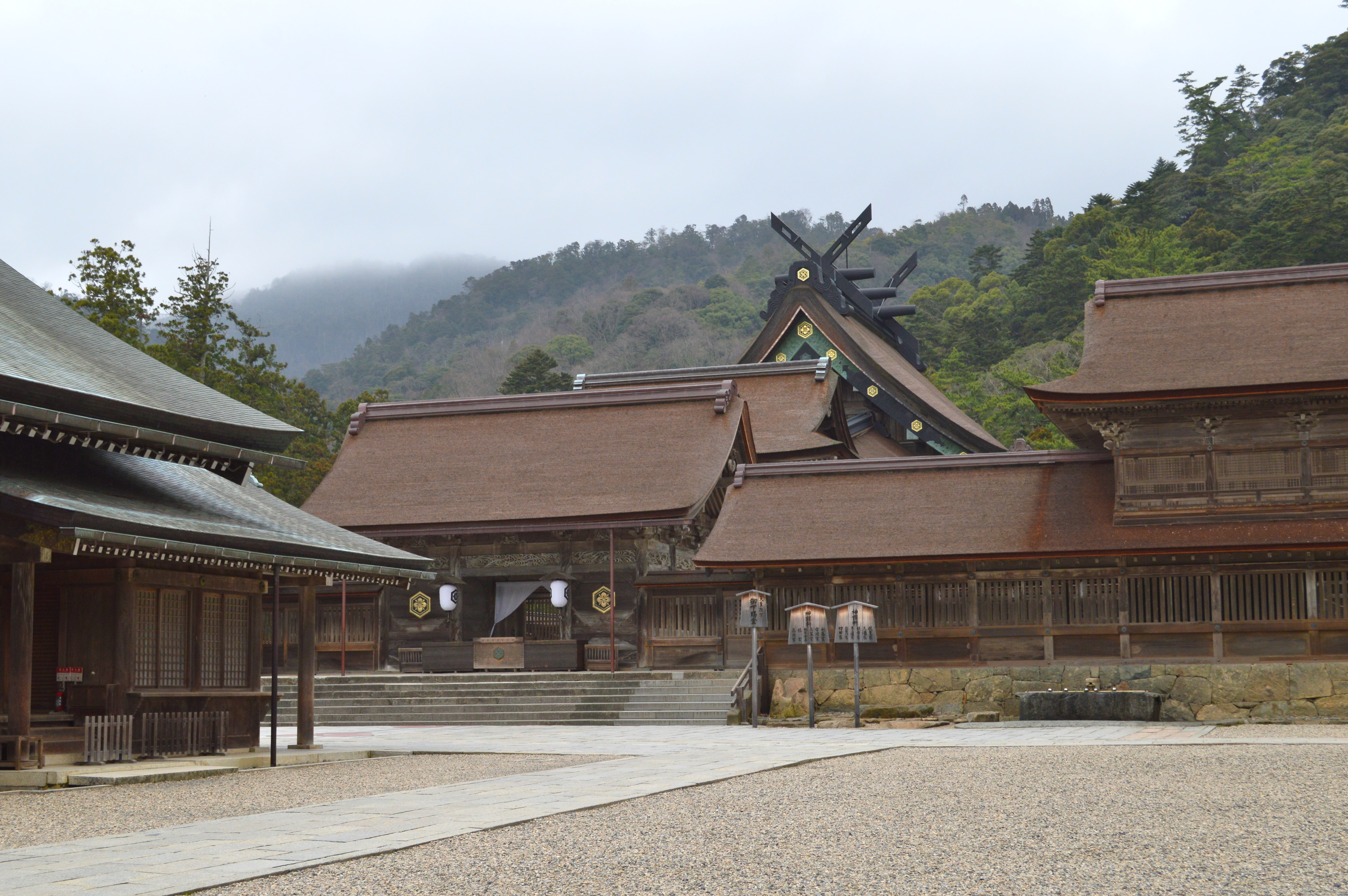 出雲大社 本殿